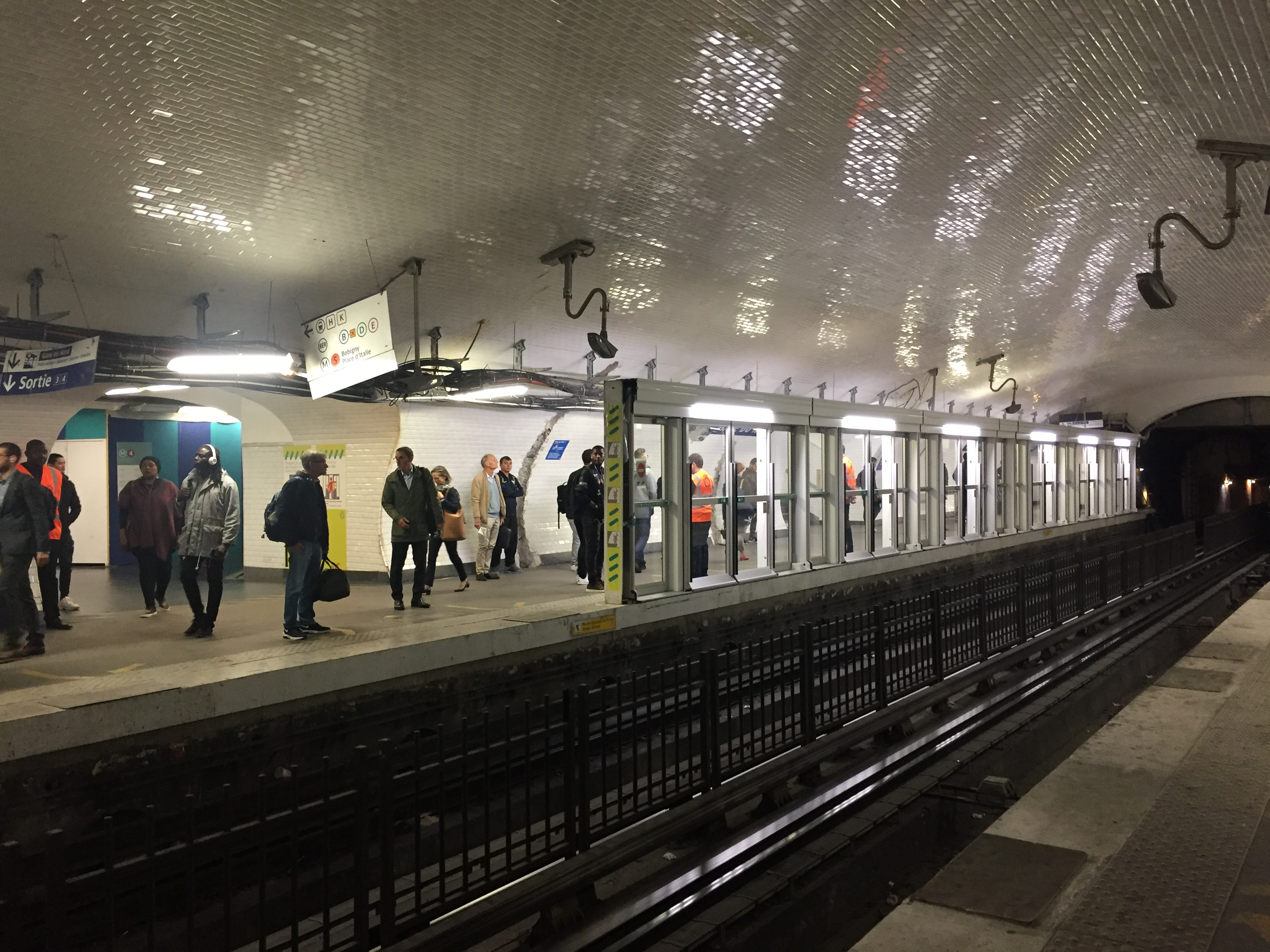 Mise en place de portes palières sur le quai direction porte de Montrouge sur les quais de la ligne 4 du métro parisien à la station Gare du nord.